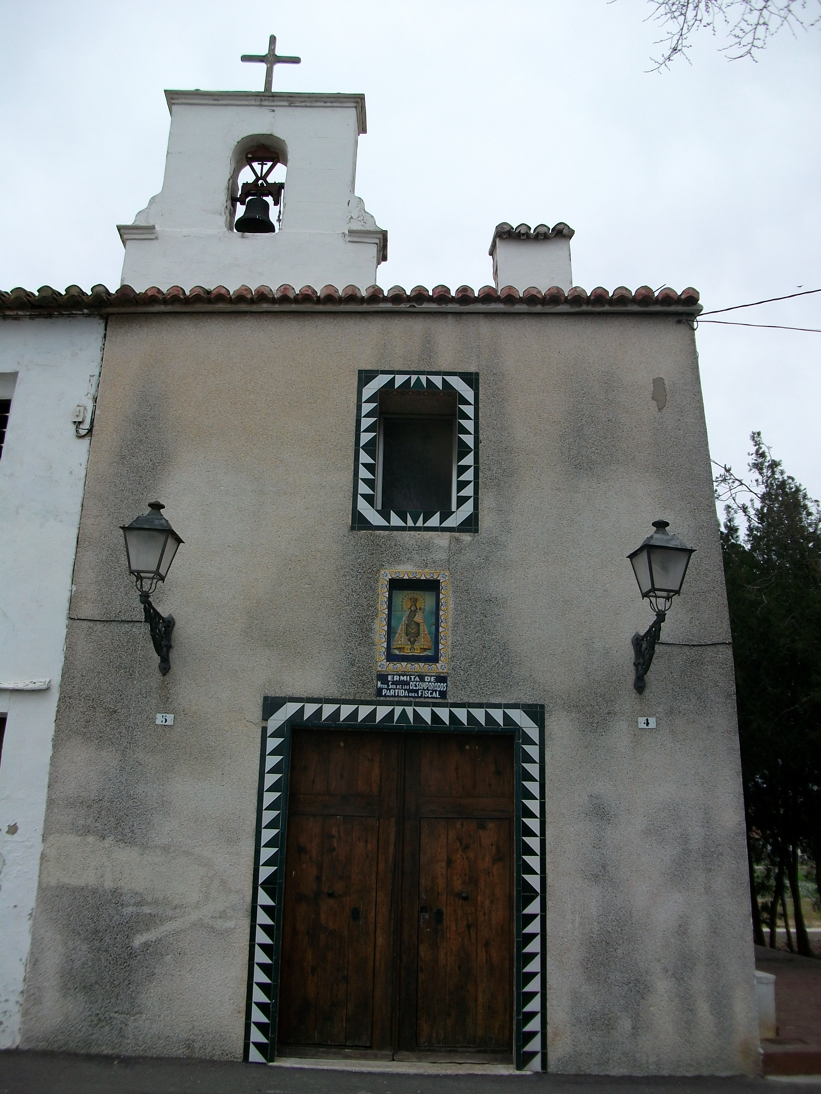 Imagen de la ermita del fiscal situada en media de la huerta de la pedanía de La Punta, Valencia